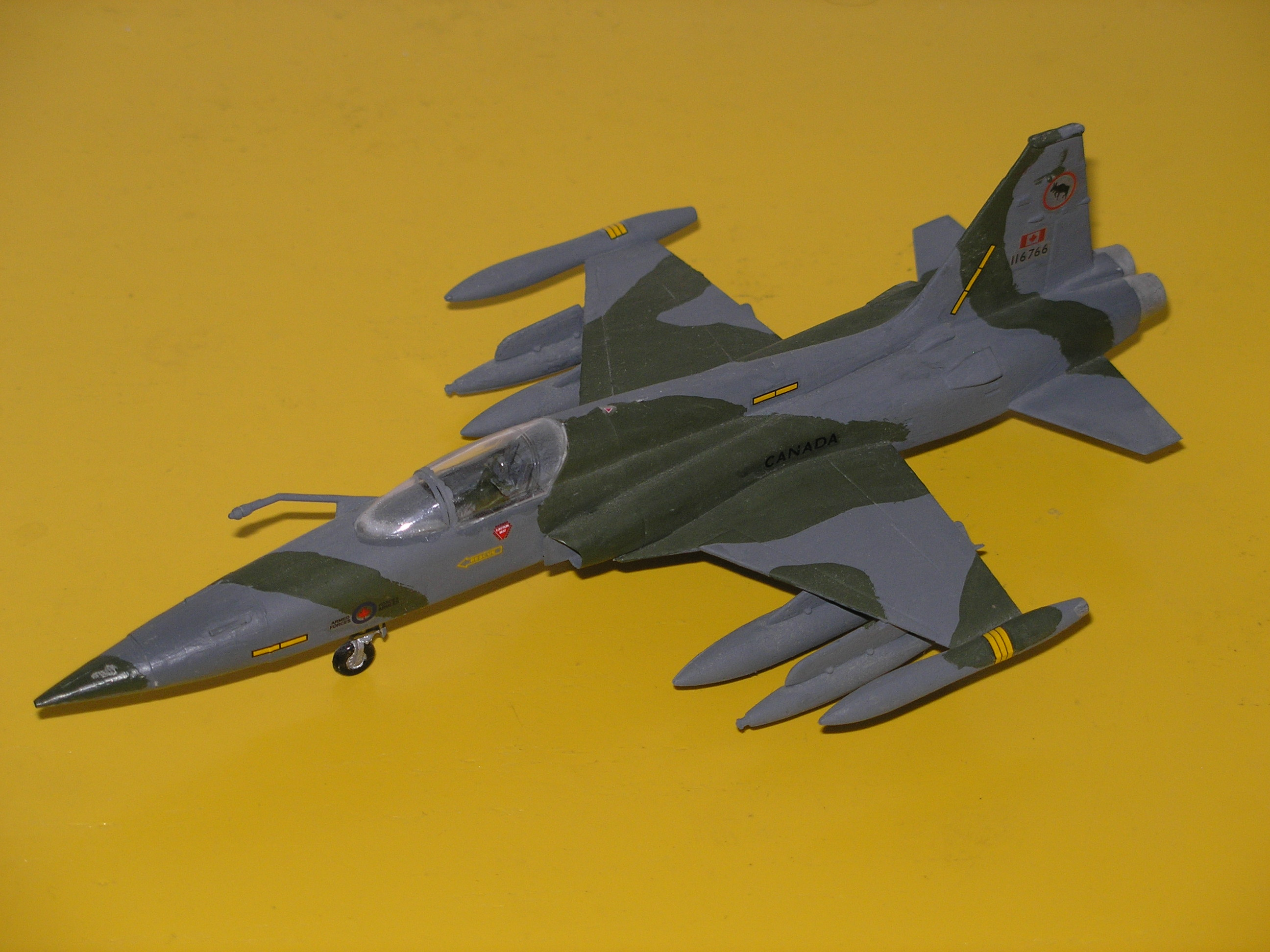 self-made